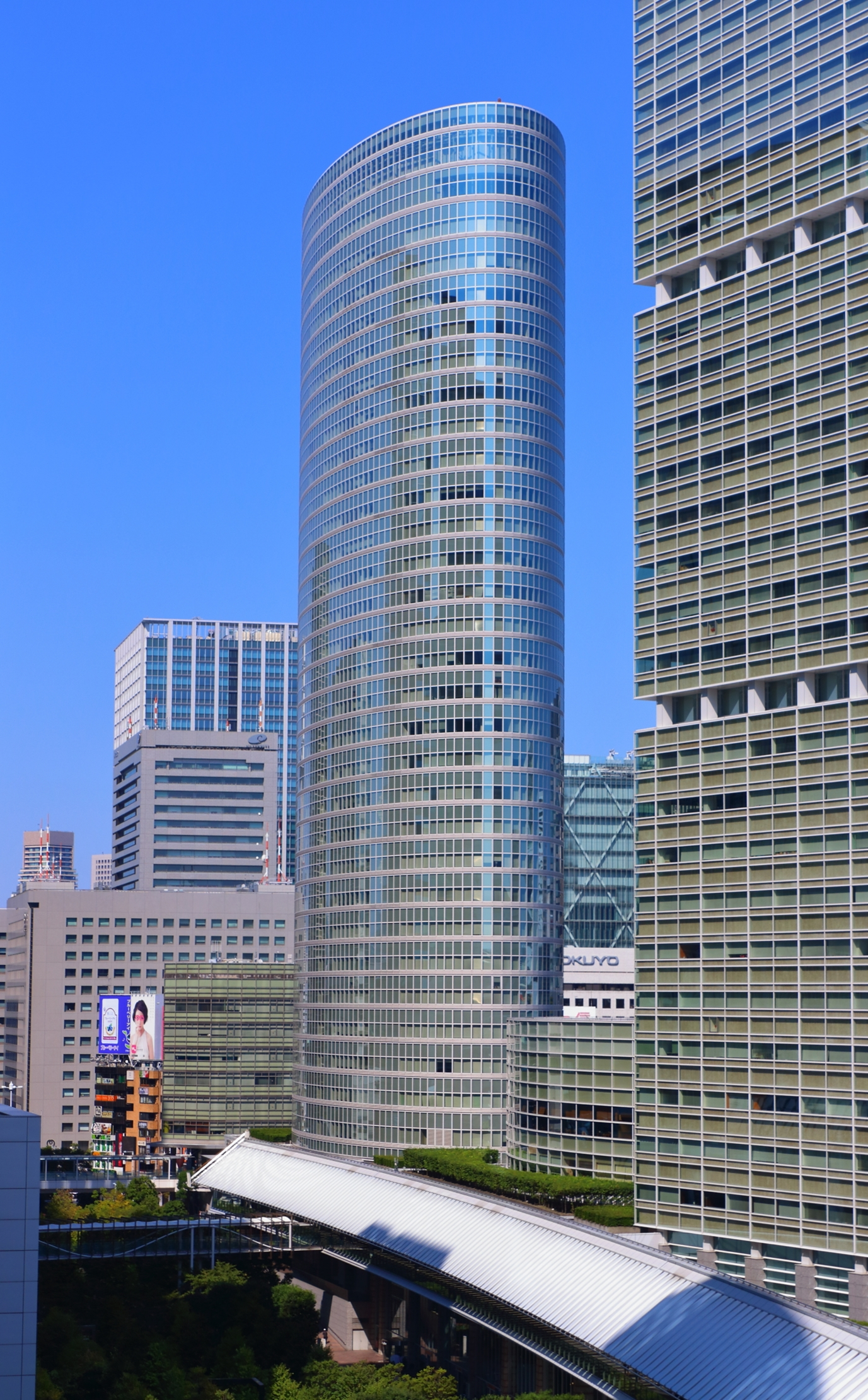 品川インターシティA棟 （東京都港区）